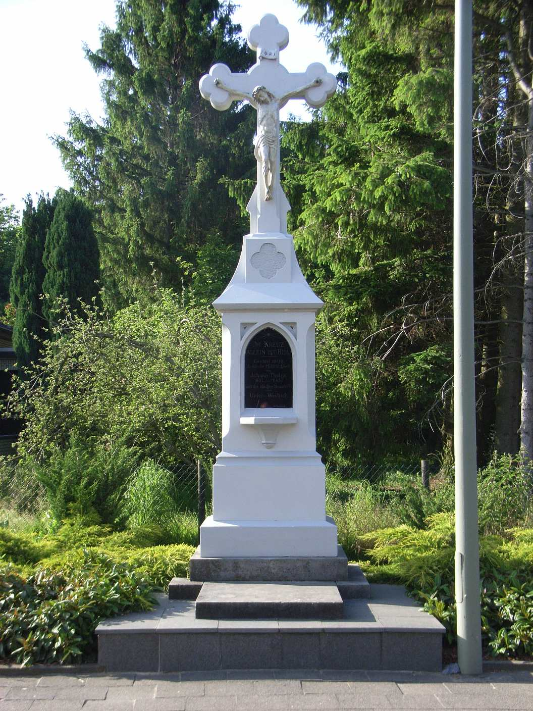 Wegkreuz errichtet 1908, Unter-Westrich, Erkelenz, NRW